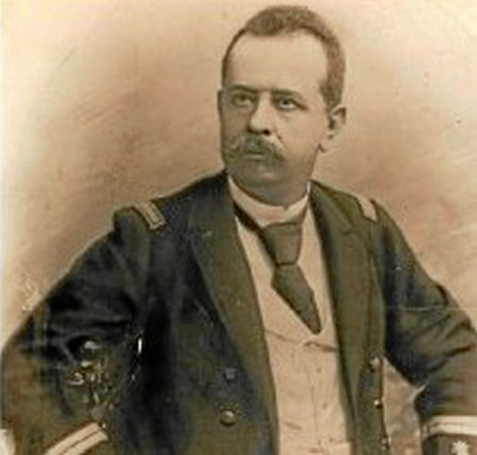 Foto sobre imagen de 1912 de Luis Bayo Hernández-Pinzón en su casa natal.